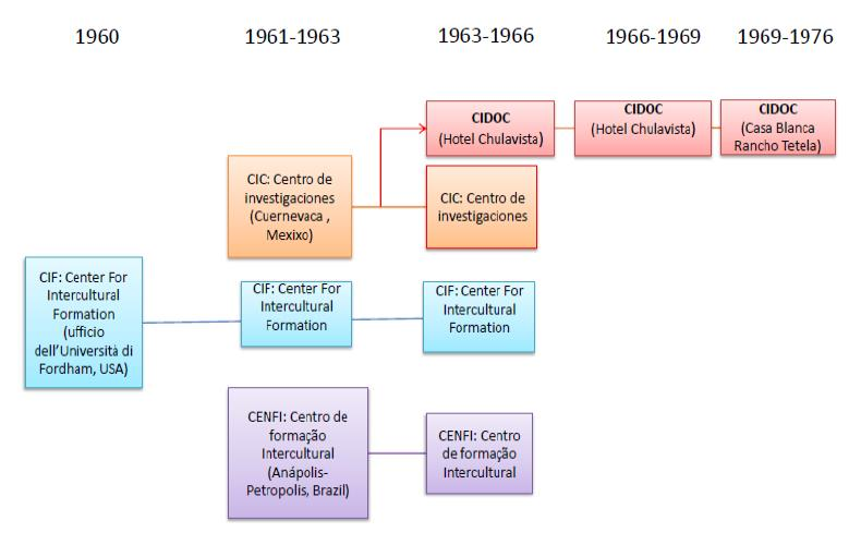 Centri educativi gestiti da Ivan Illich, in M. Esposito, Ivan Illich; l'implicito pedagogico, la filosofia del limite come modello di educazione ambientale, Yiucanprint, 2016.